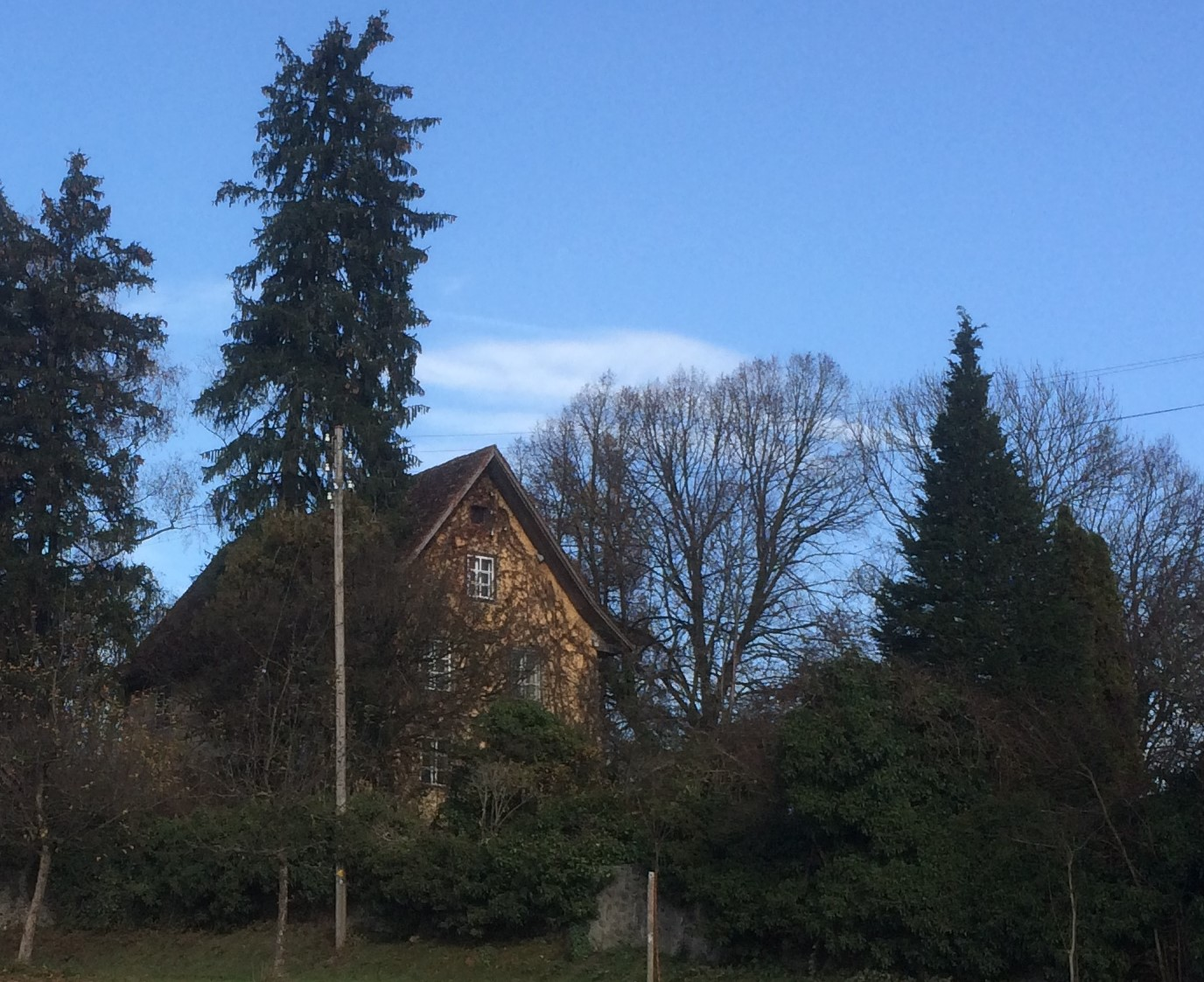 Landhaus Kapf in Althäusern bei Aristau. Wohnhaus der Dichterin Erika Burkart und des Schriftstellers Ernst Halter. Ansicht von Südwesten.